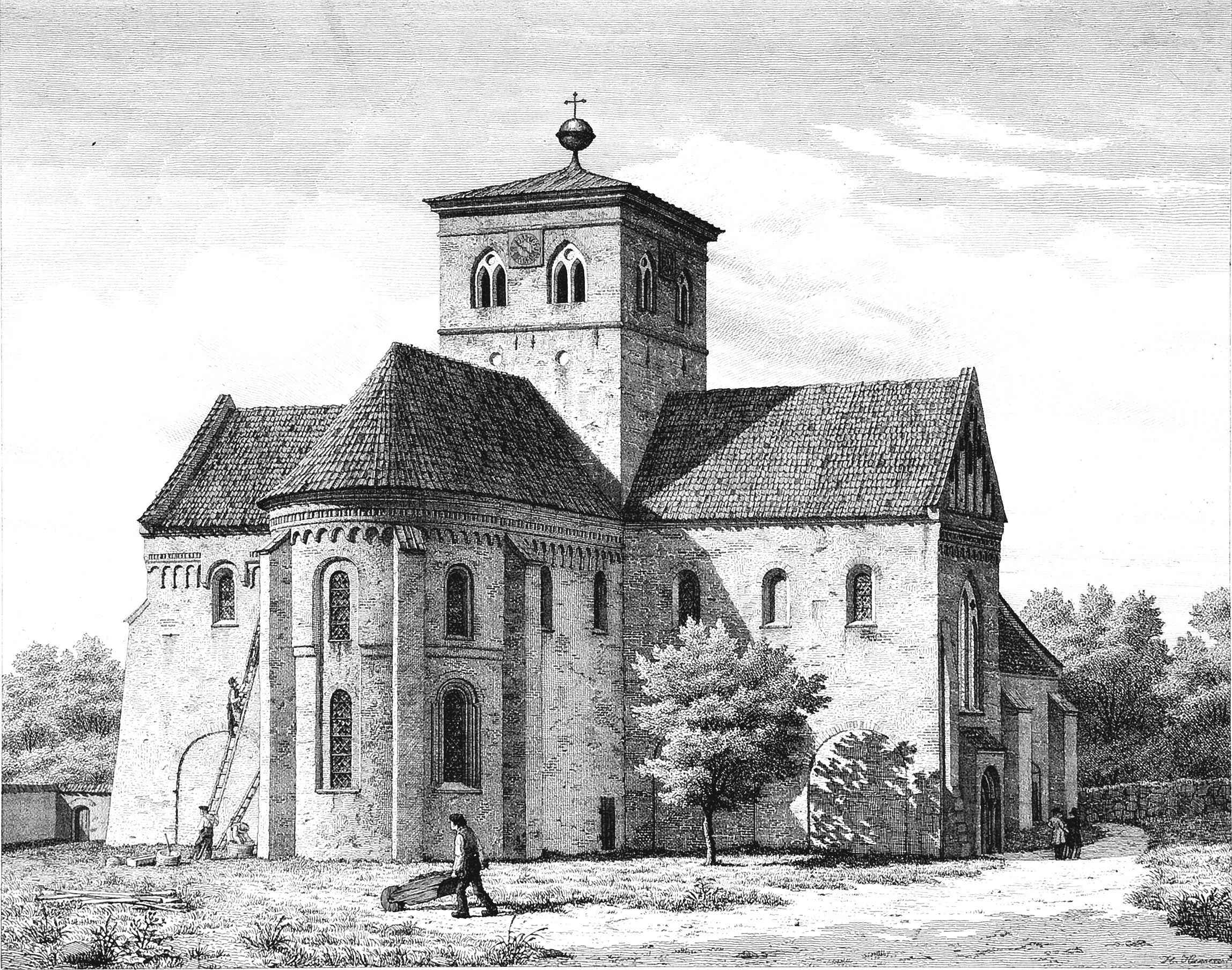 Stik af Sct. Bendts Kirke, ca. 1850.